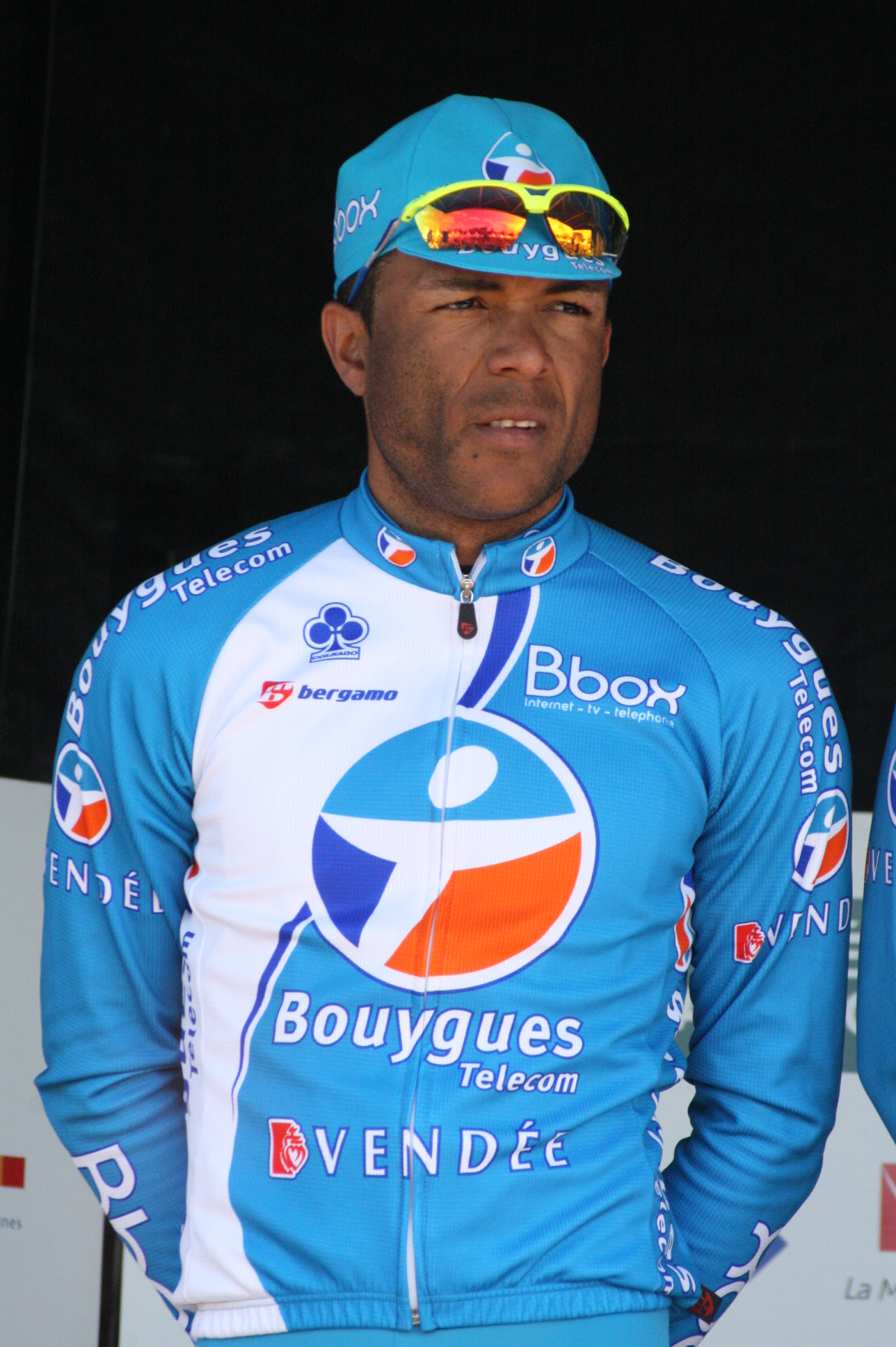 Yohann Gène lors de la présentation des équipes des 4 jours de Dunkerque 2010